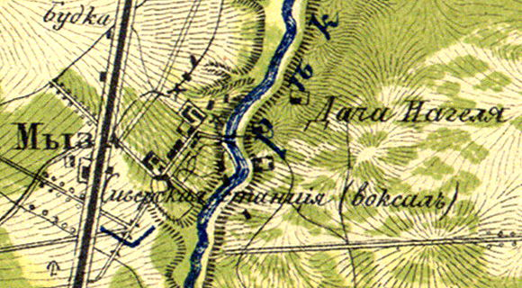 Посёлок Сиверский на карте 1860 года.